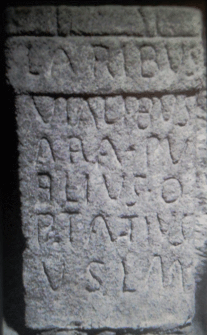 Ara aos Lares Viales de Grava, Silleda no Museo de Pontevedra